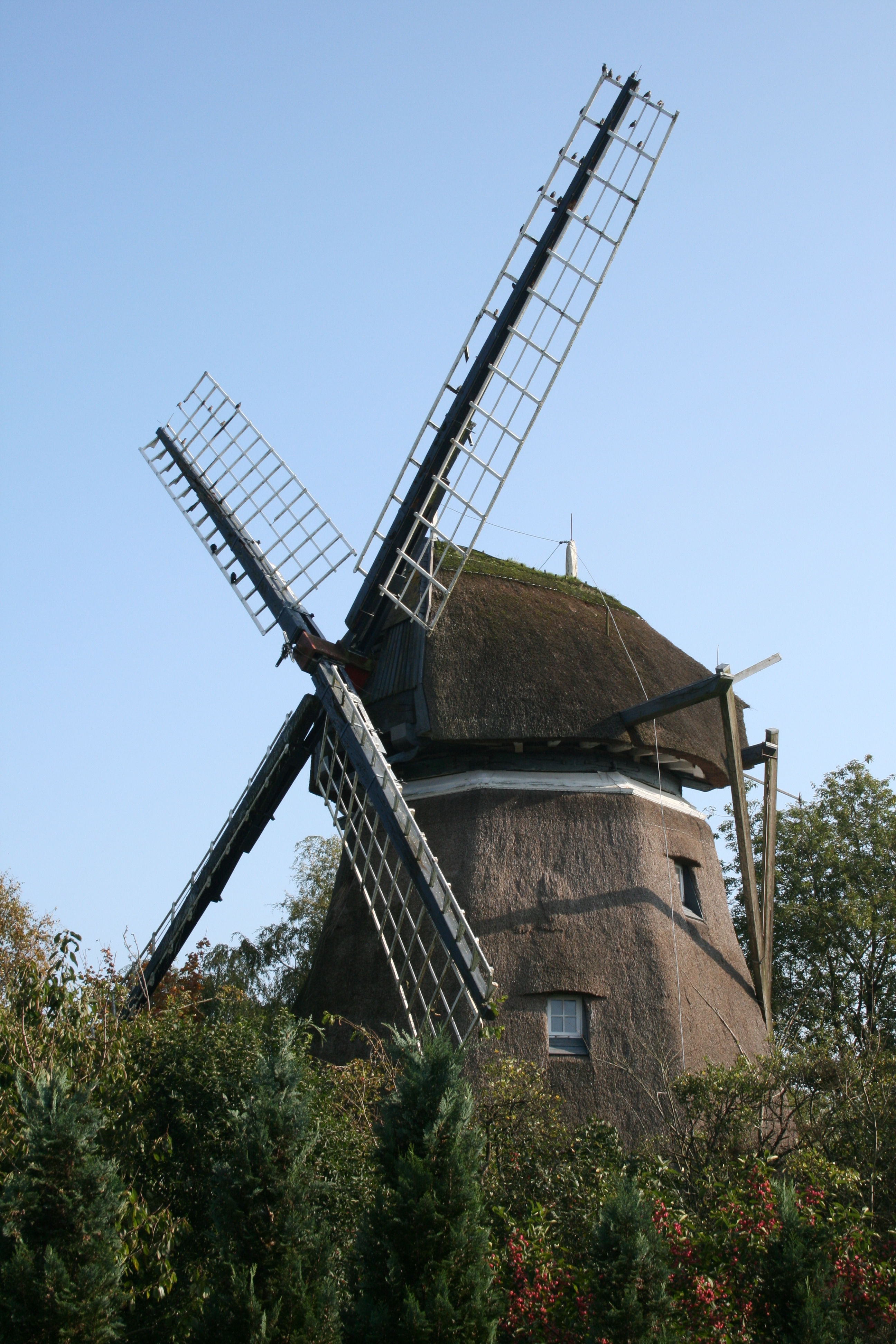 Kellerholländer-Mühle Hauptstraße Joldelund